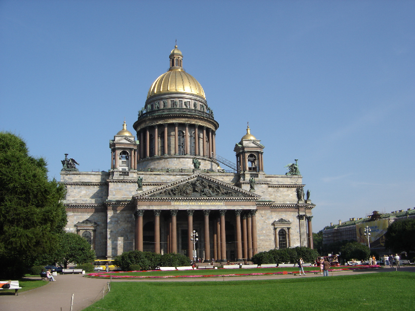 Cathédrale Saint-Isaac à Saint-Pétersbourg